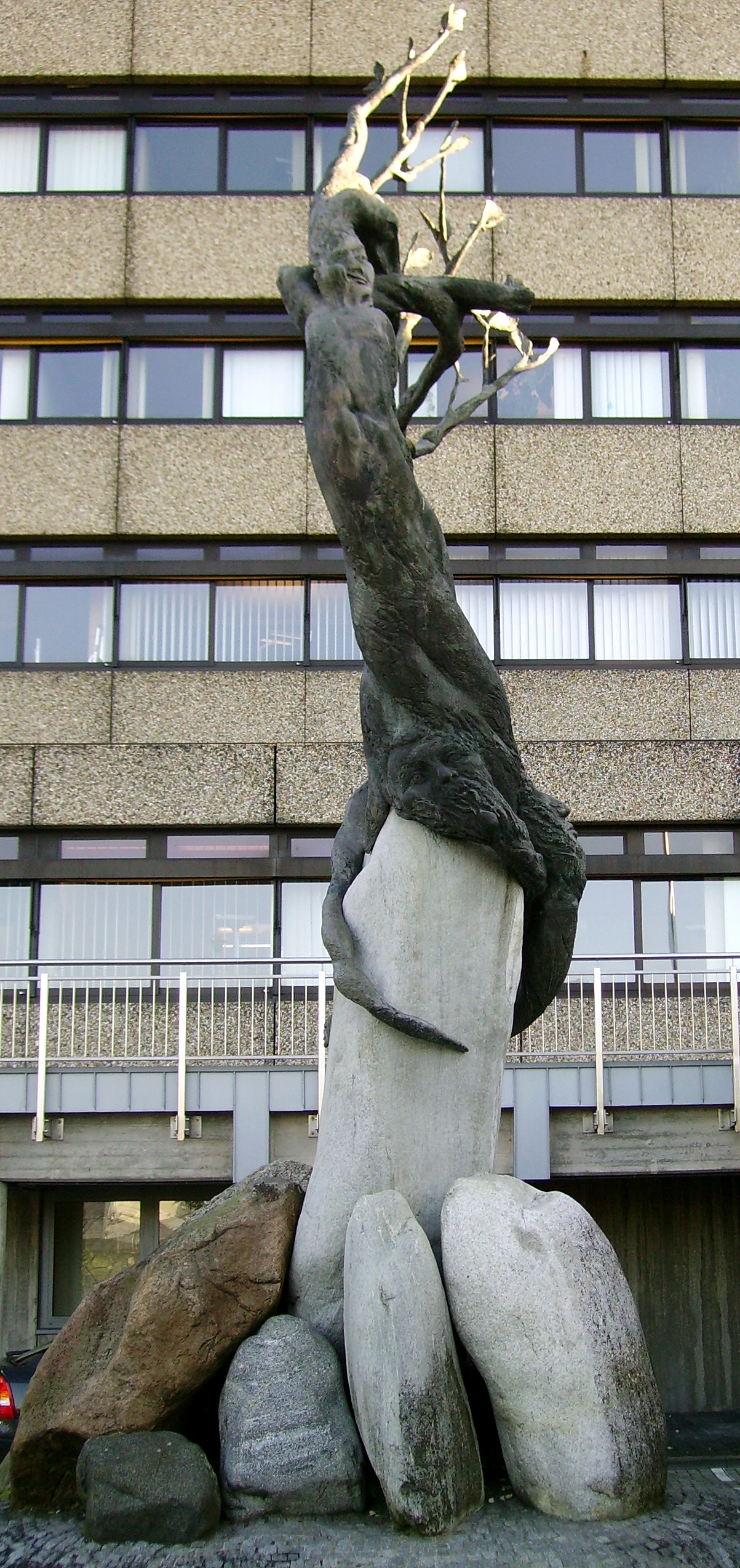 Denkmal Salzufler Lebensbaum vor dem neuen Rathaus